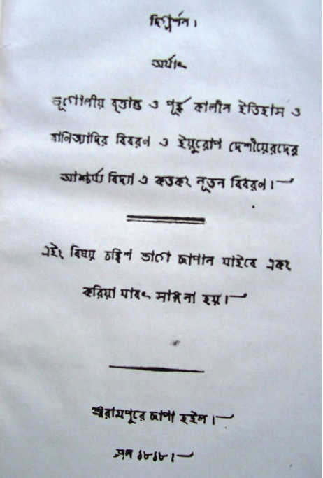 ১৮১৮ খ্রিস্টাব্দে প্রকাশিত দিগদর্শন পত্রিকার একটি পাতা।